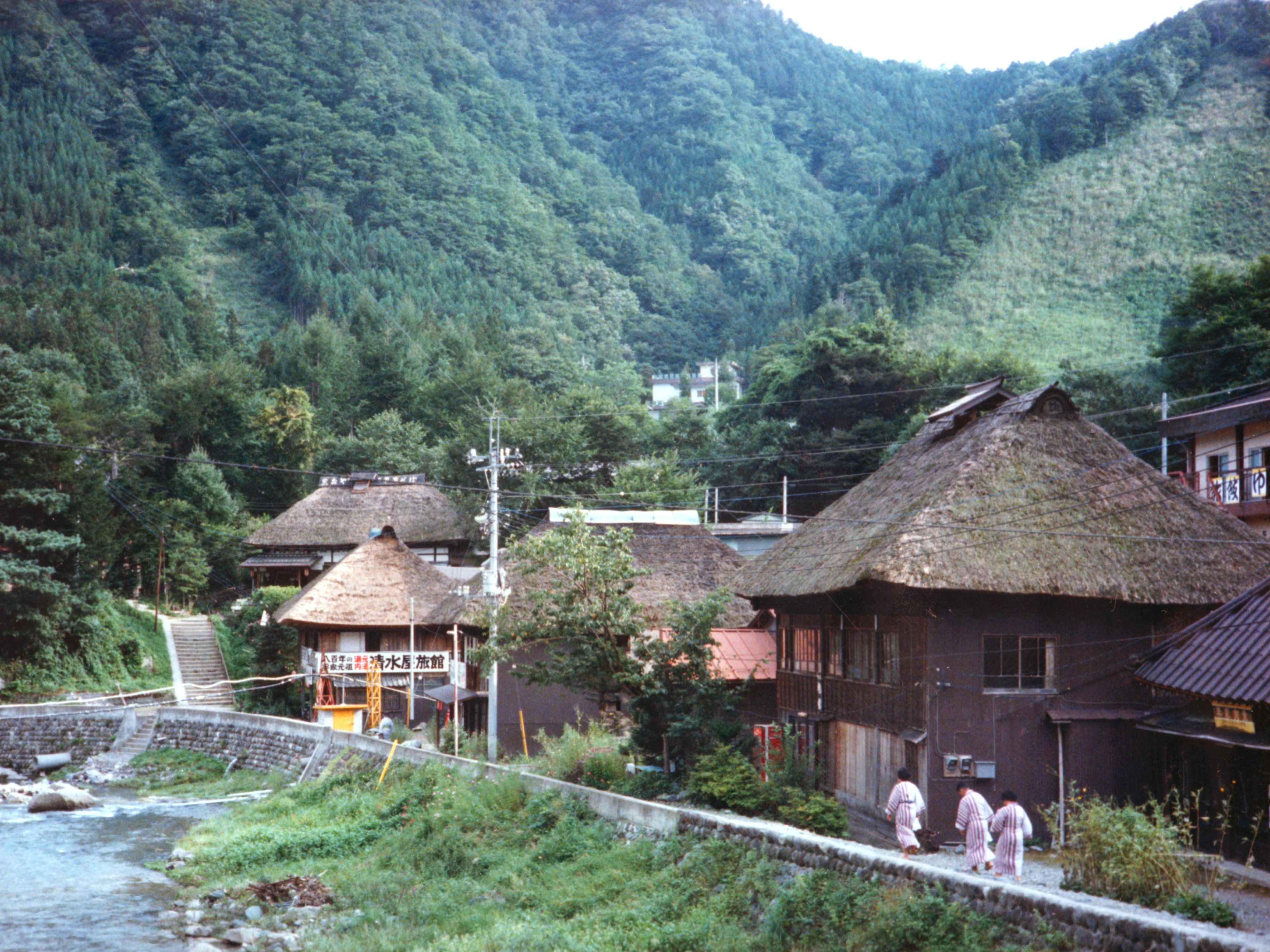 栃木県日光市湯西川温泉「平家集落」1986年の風景